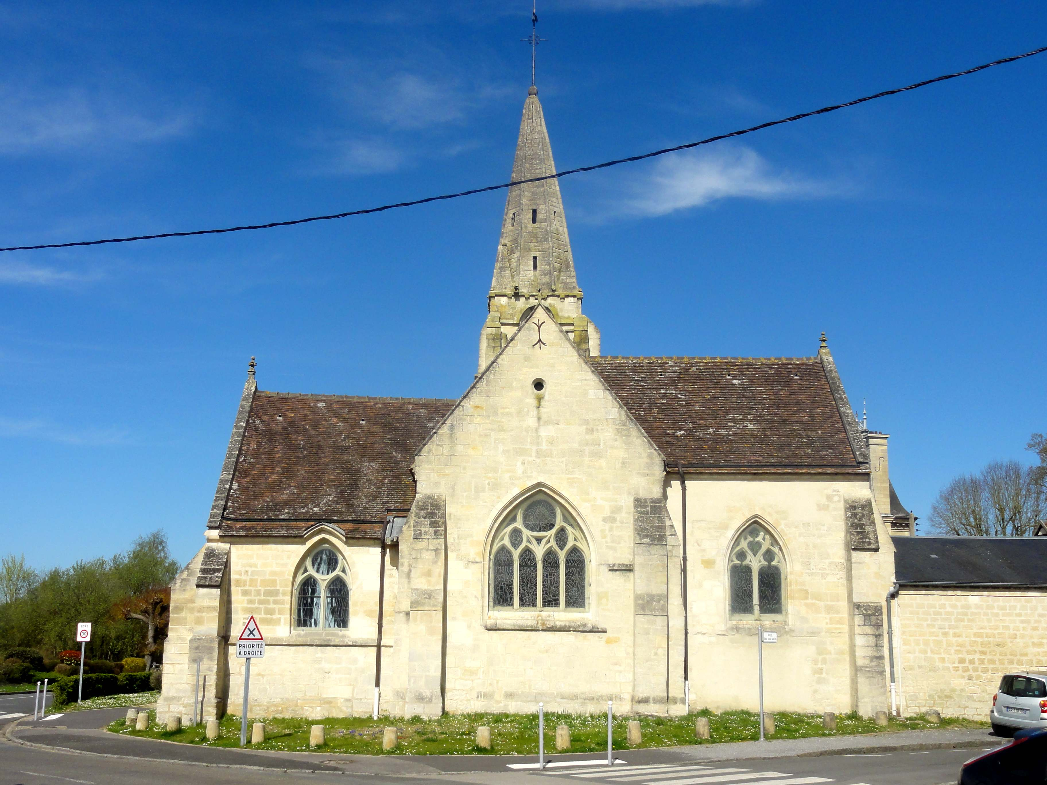 Vue depuis l'est.